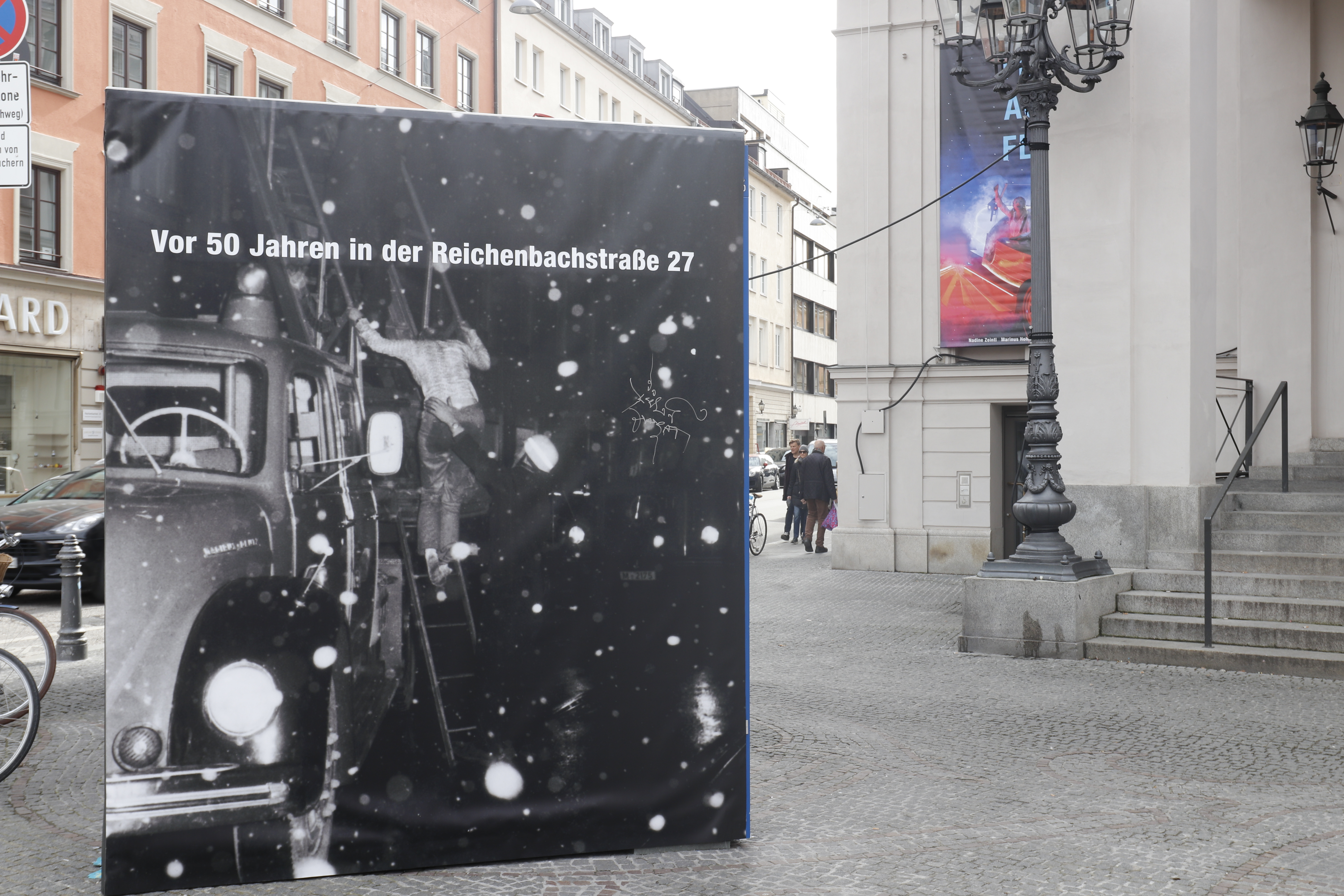 Gedächniscontainer für den Brandanschlag auf das Altenheim der jüdischen Gemeinde München von 1970. Aufgestellt zum 50. Gedenktag 2020 auf dem Gärtnerplatz.